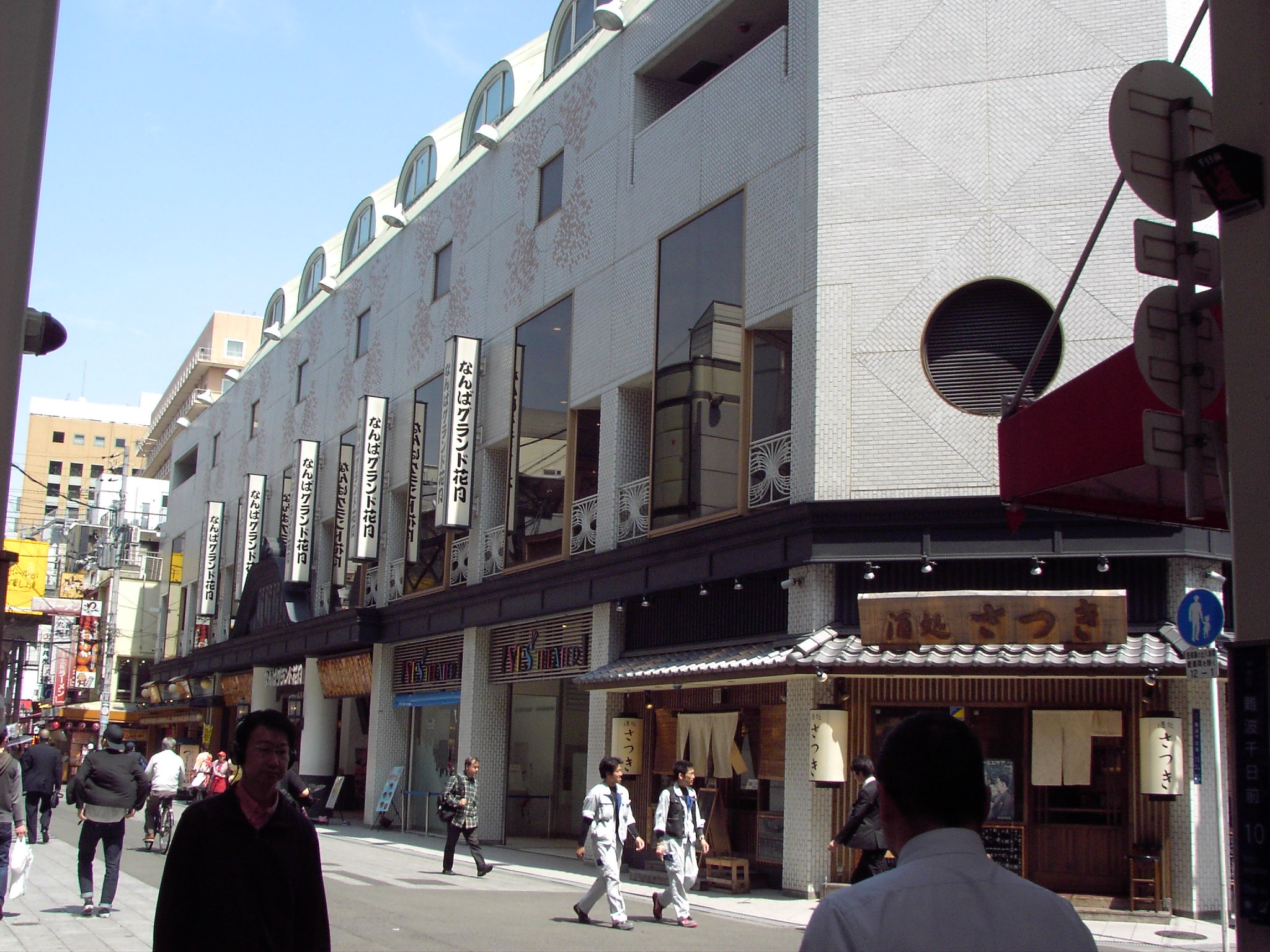 なんばグランド花月